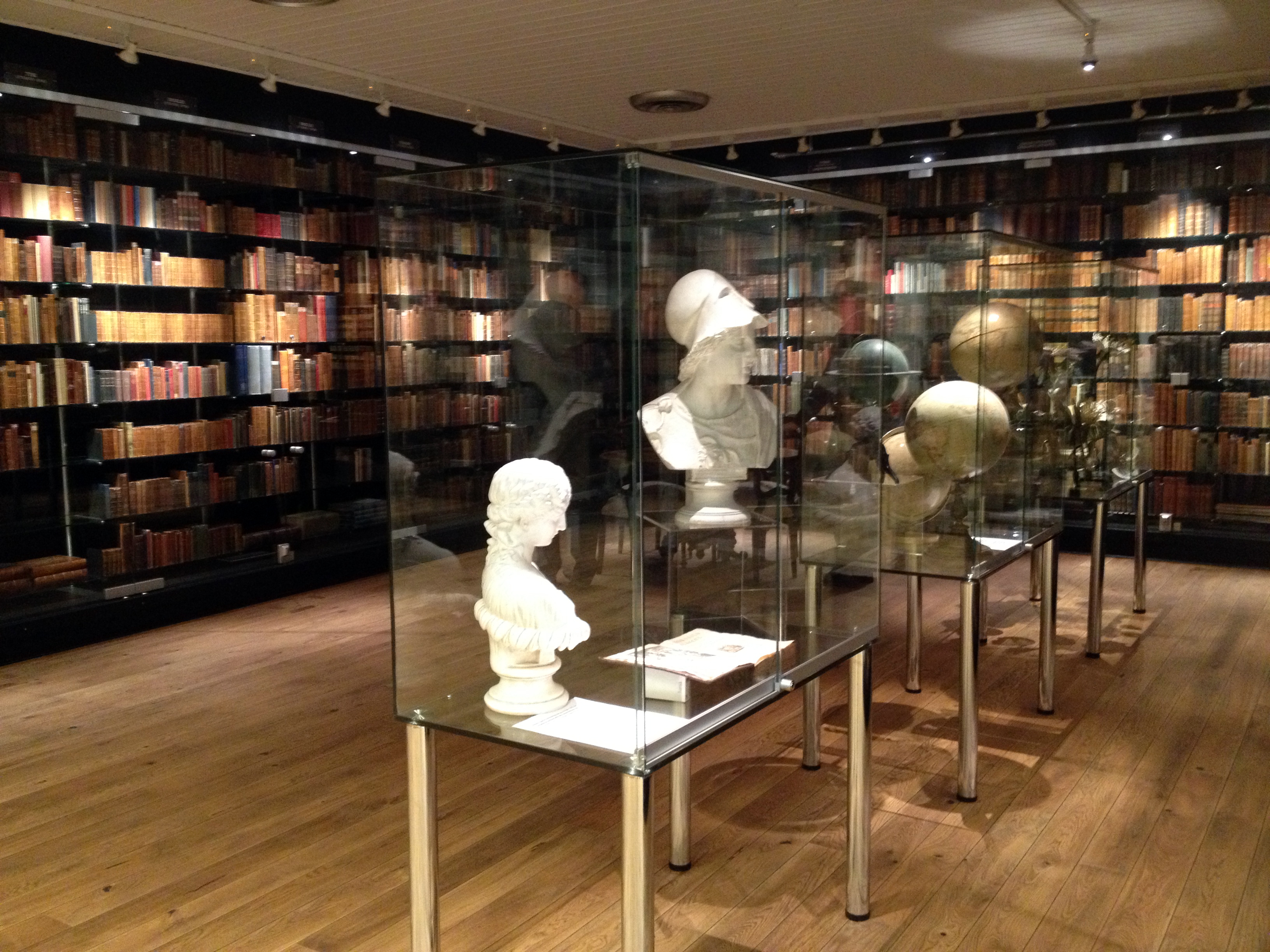 Den historiske boksamlingen ved Kristiansand katedralskole Gimle